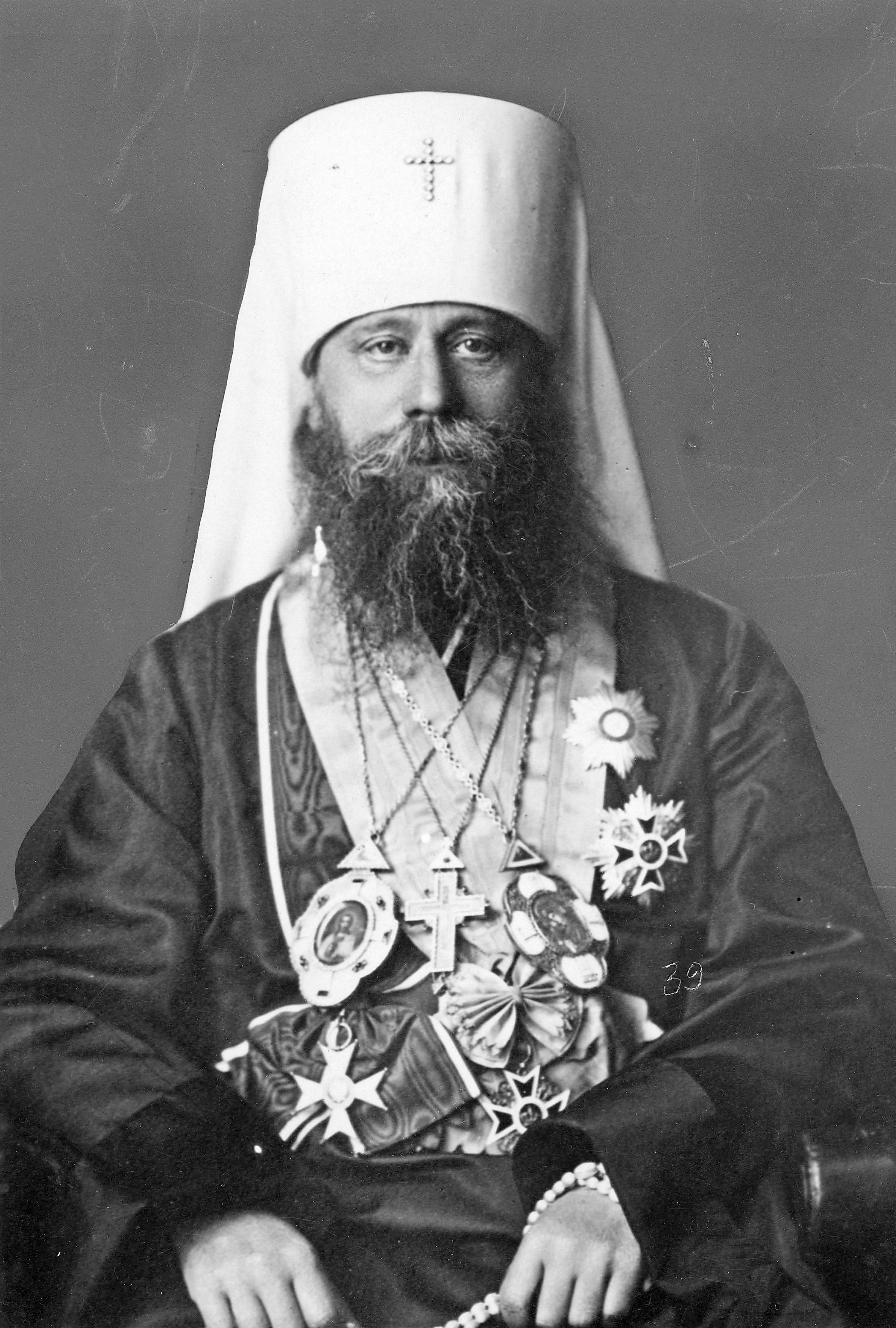 Metropolita warszawski i całej Polski Dionizy (Waledyński)